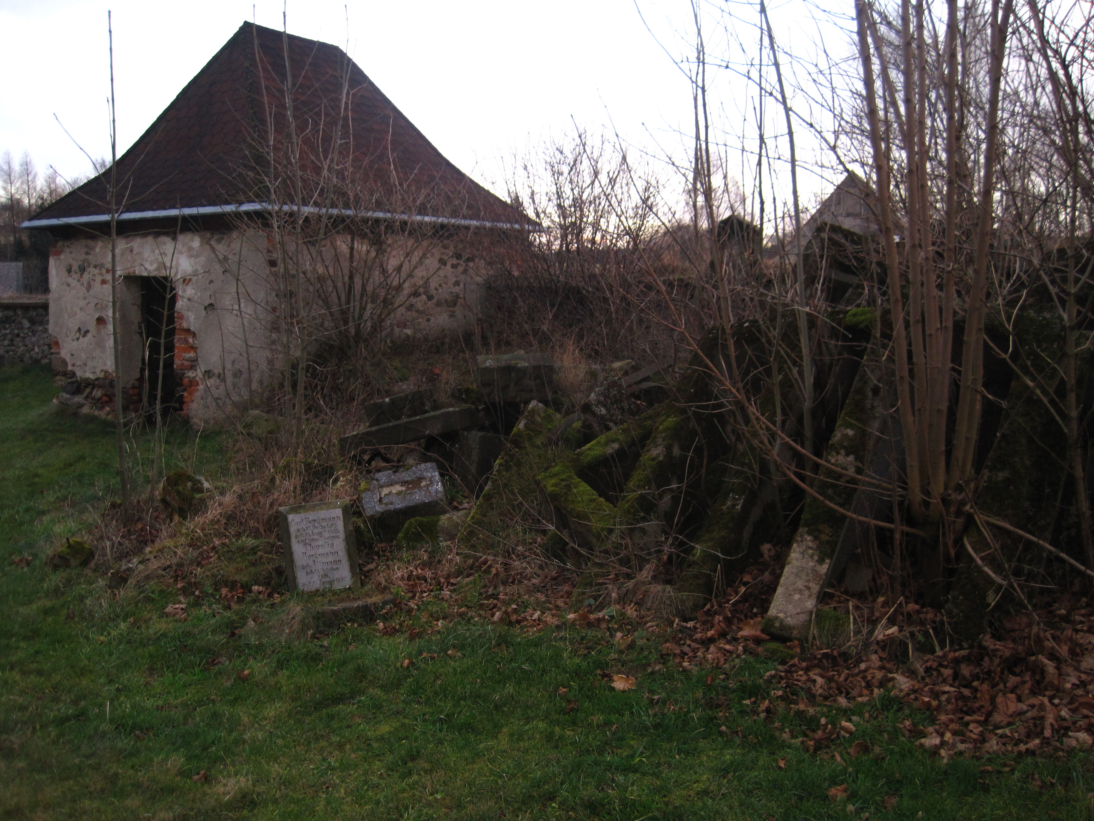 Kostel svatého Martina, střed obce, Dolní Oldřiš.